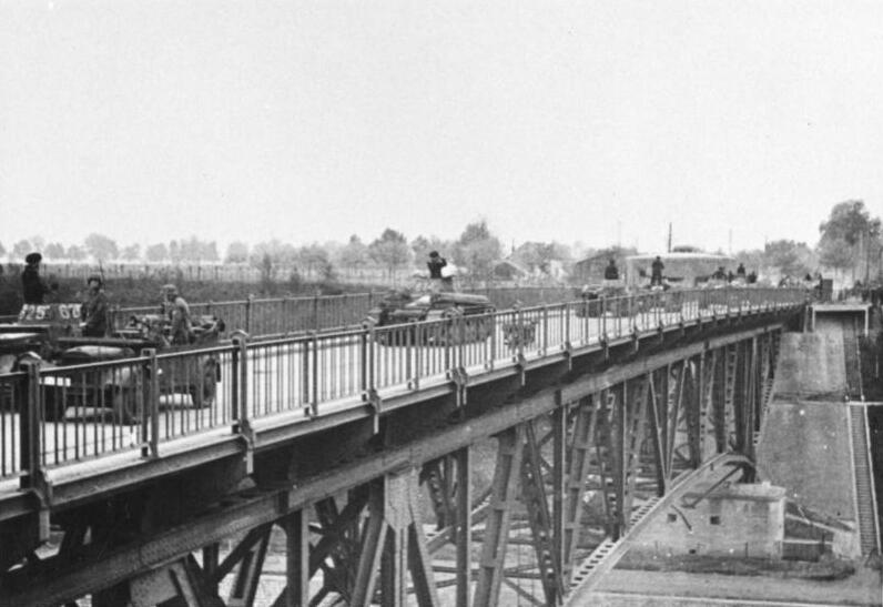 Mot. Einheiten passieren die Albert-Canal-Brücke. 11.5.1940, 10.00 Uhr